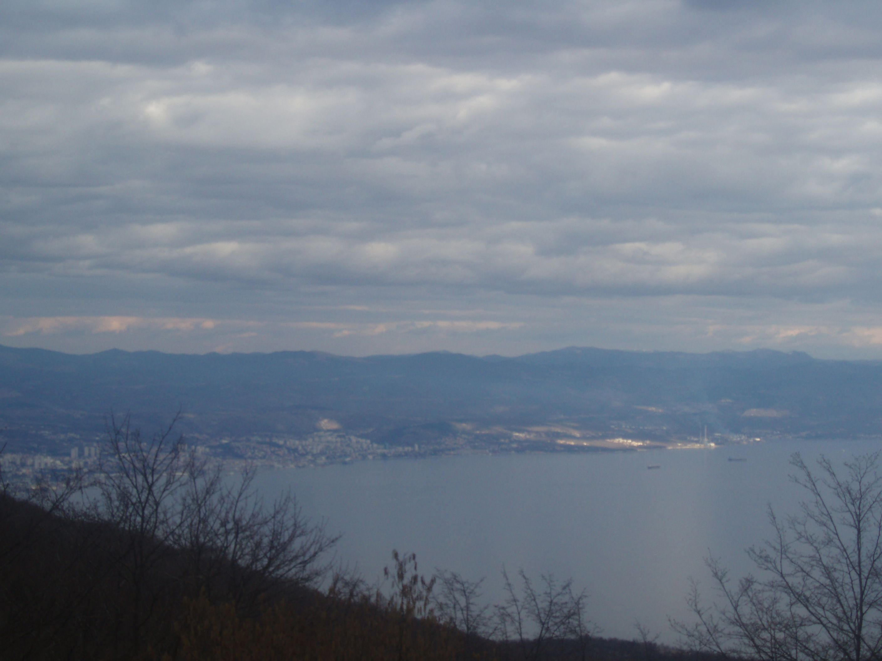 Riječki Zaljev, pogled s Učke